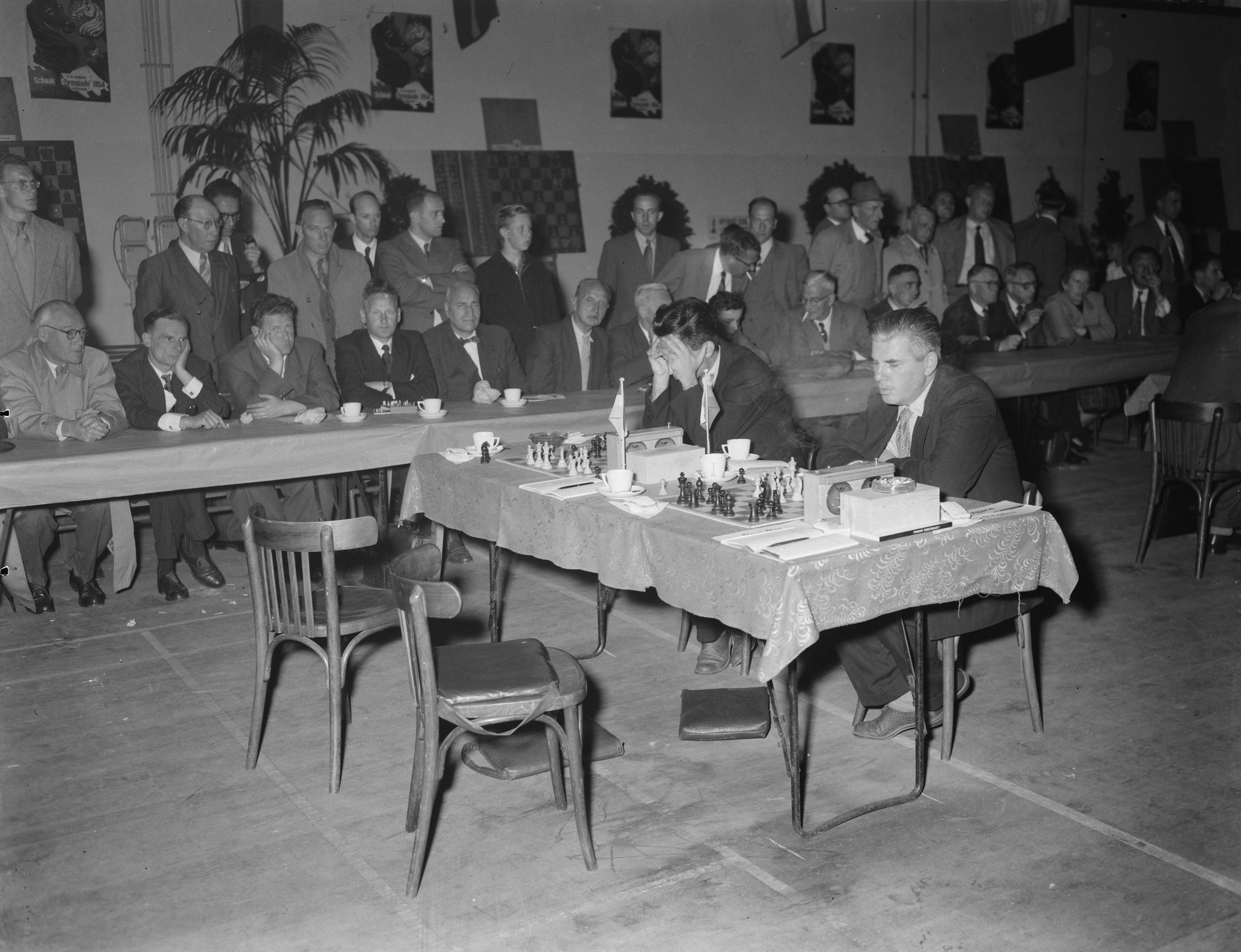 Collectie / Archief : Fotocollectie Anefo Reportage / Serie : [ onbekend ] Beschrijving : Schaakolympiade Amsterdam, Neykirch en Minev (Bulgaren) Datum : 22 september 1954 Locatie : Amsterdam, Noord-Holland Trefwoorden : schaakolympiades Fotograaf : Noske, J.D. / Anefo Auteursrechthebbende : Nationaal Archief Materiaalsoort : Negatief (zwart/wit) Nummer archiefinventaris : bekijk toegang 2.24.01.04 Bestanddeelnummer : 906-7345